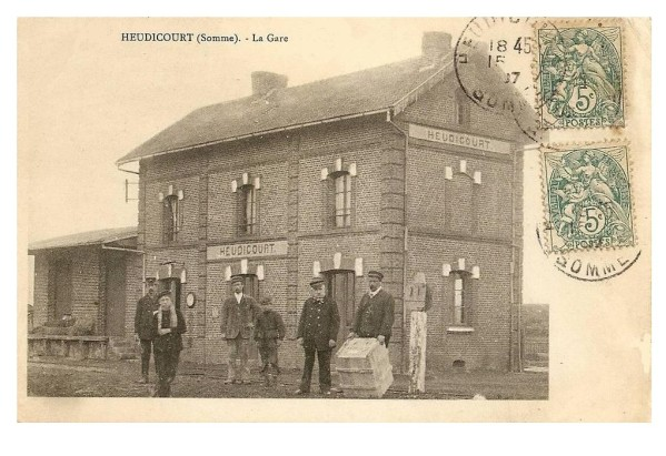 La gare vers 1910